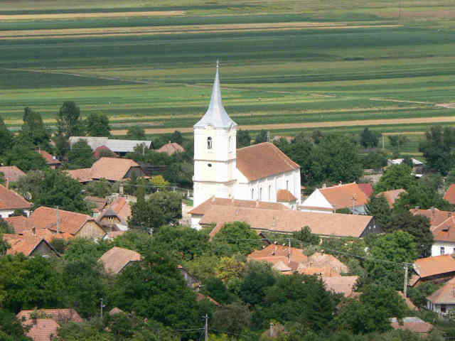 View of Poian (Kézdiszentlélek)